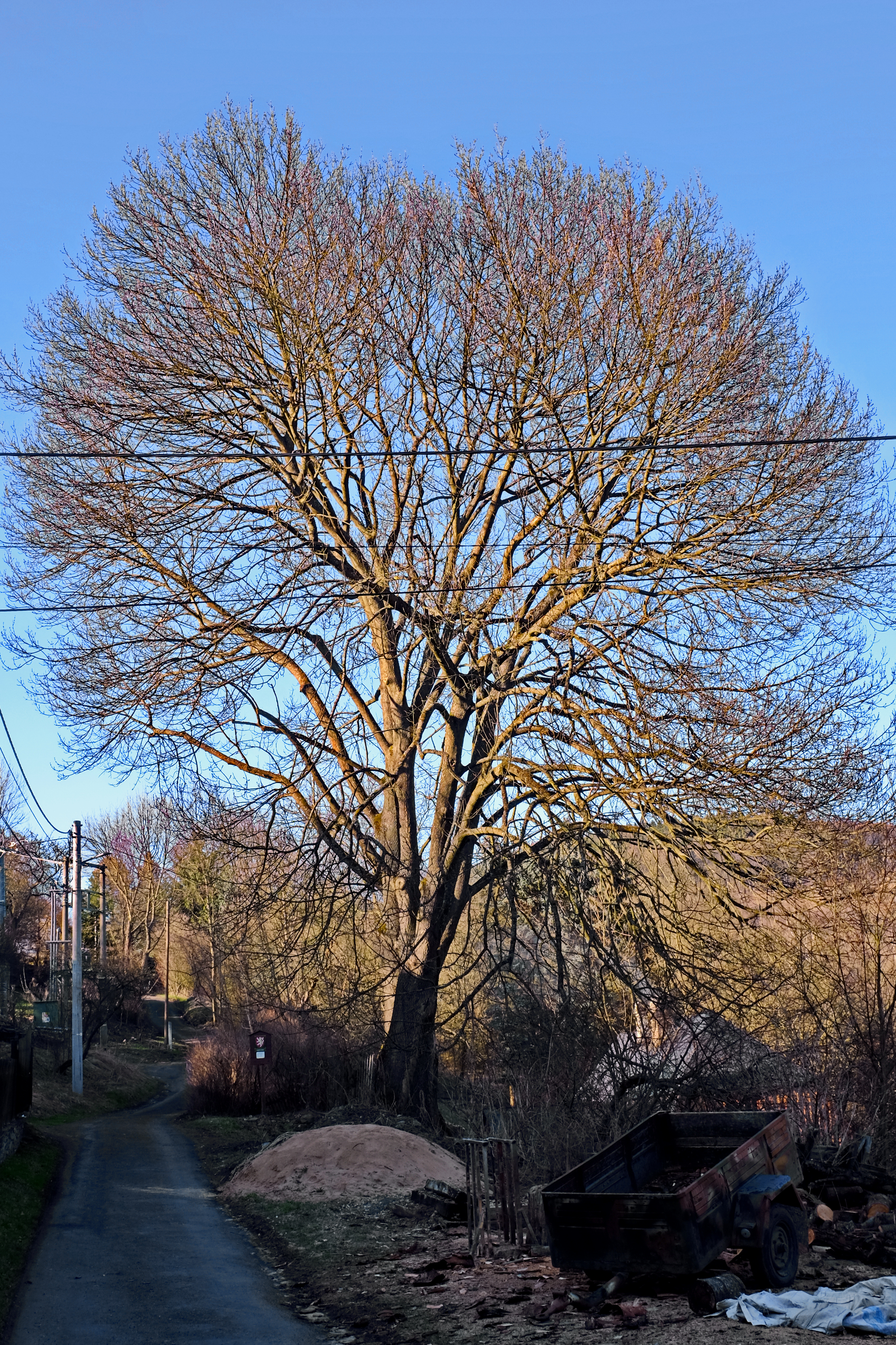 Památný strom - Jasan u kovárny - Horní Hrad, okres Karlovy Vary